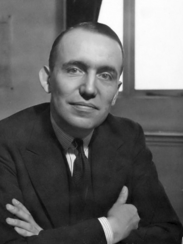 Mr. S.G.M. baron van Voorst tot Voorst (voormalig consul in Bayonne, Frankrijk. 1940-1945